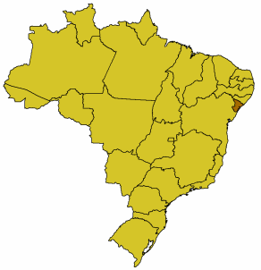 Karte Brasiliens, Sergipe hervorgehoben, GFDL nach der Vorlage Bild:Brasilien Bundesstaaten.png